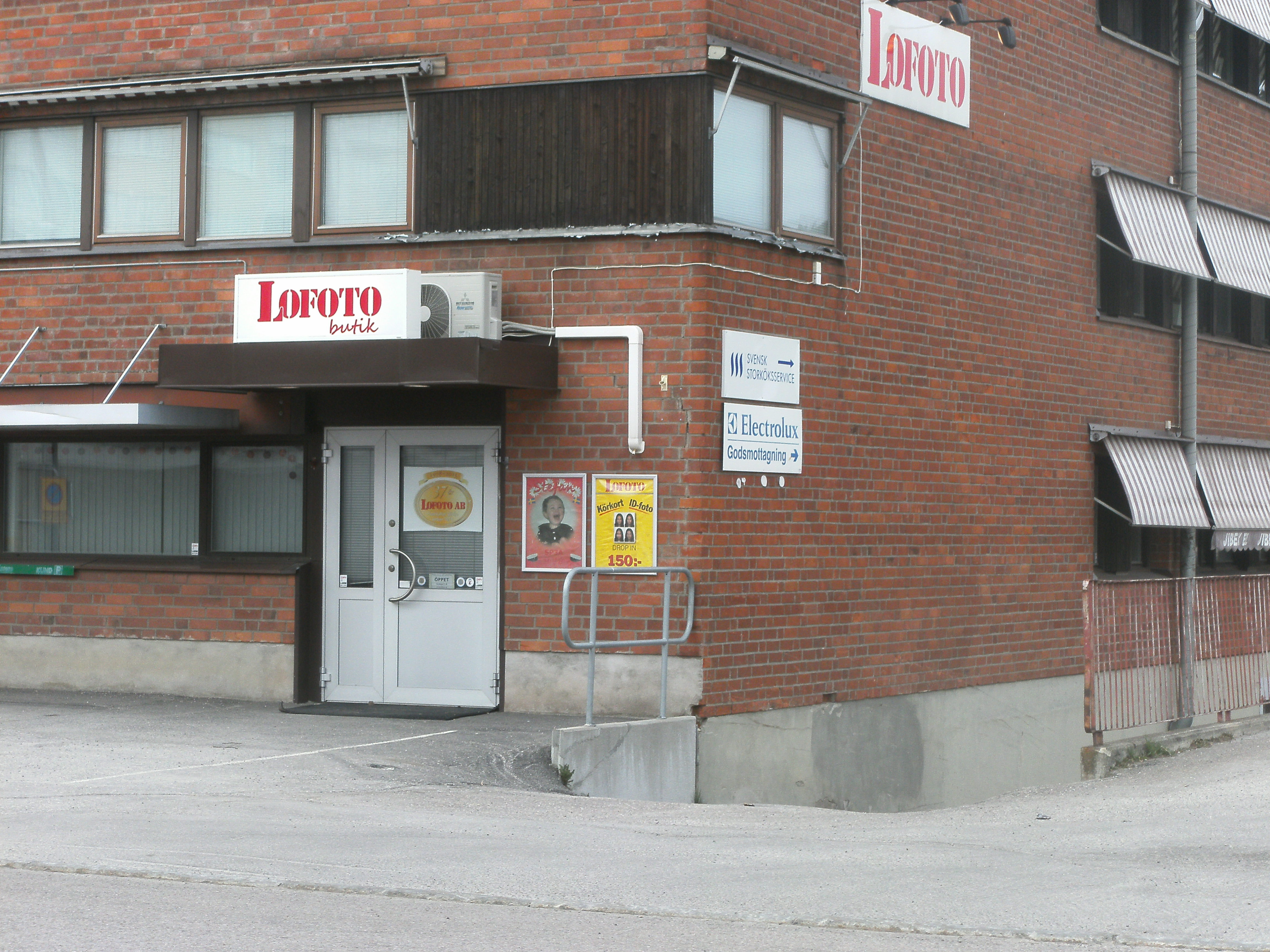 Lofotos butik i Nacksta, Sundsvall